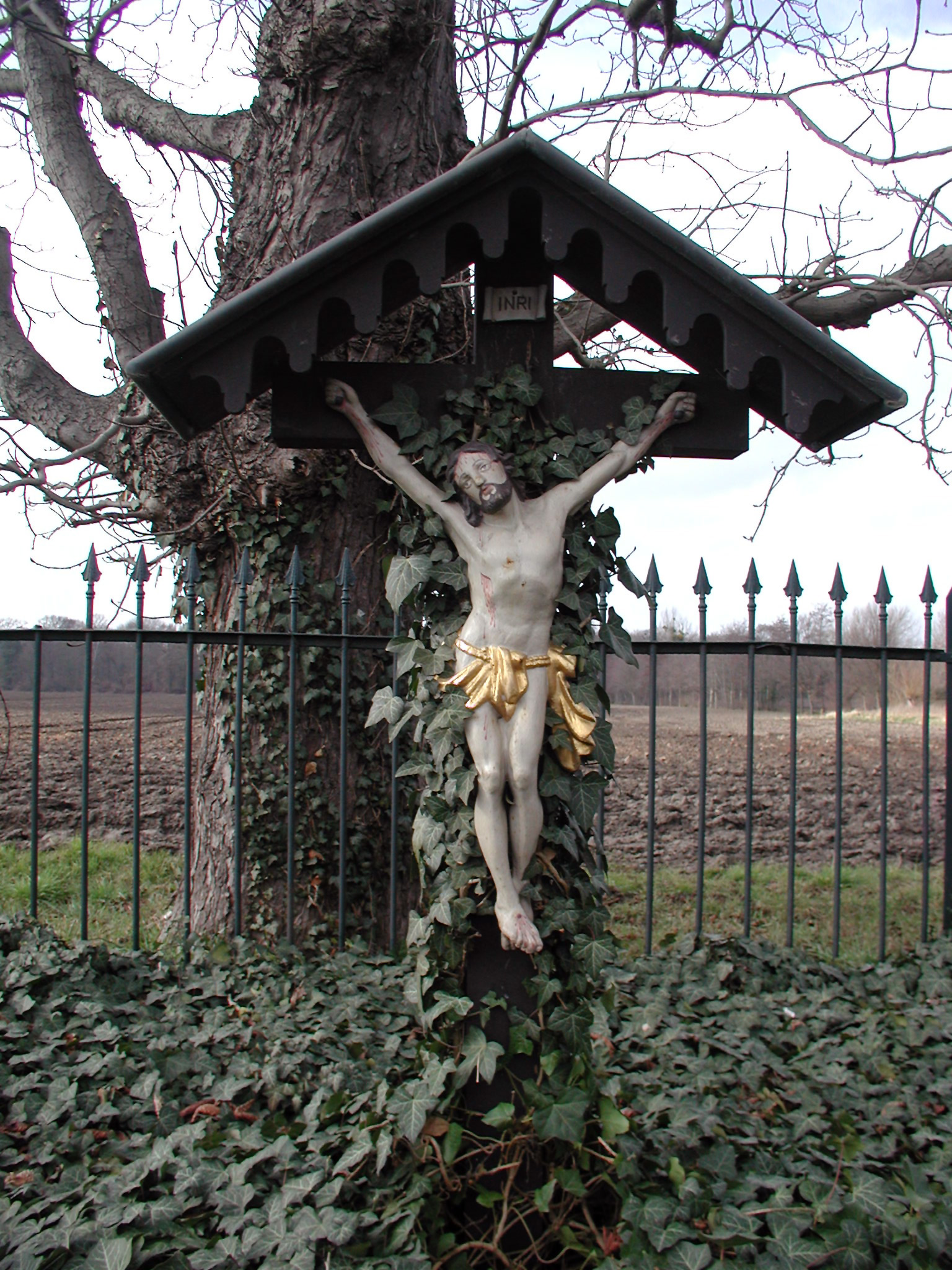 Palmersdorfer Hof, Brühl. Wegekreuz